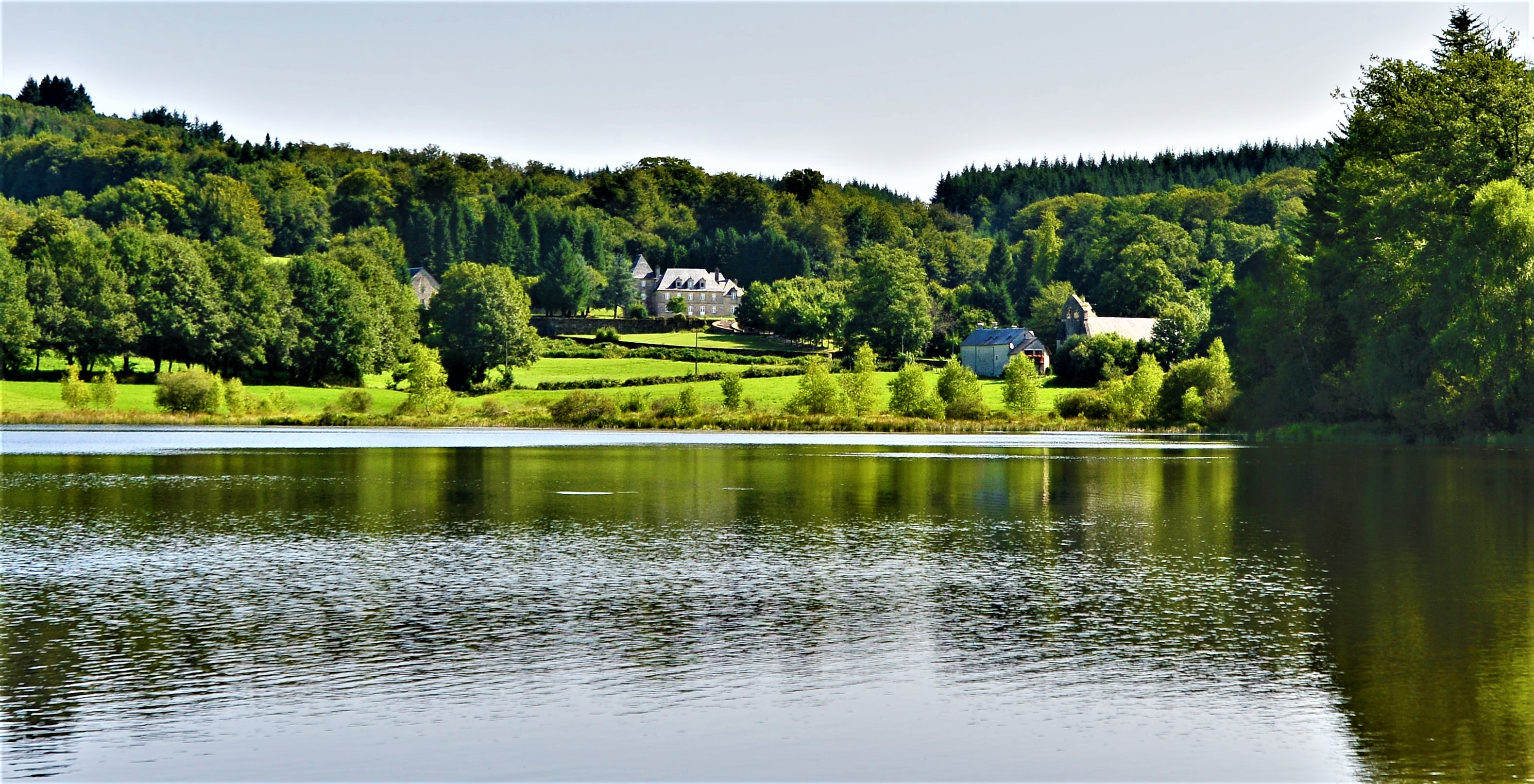 Vus depuis le Petit Étang, le château et l'église de Saint-Hilaire-les-Courbes, Corrèze, France.